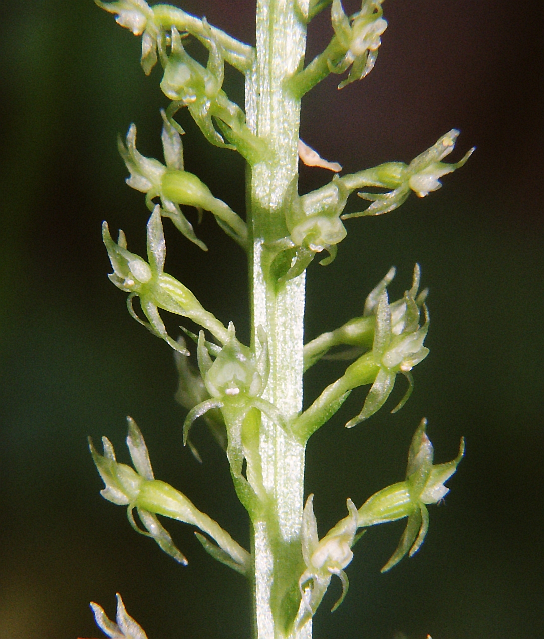 Malaxis monophyllos, Berchtesgadener Alpen, Germany